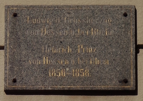 Gedenktafel für Großherzog Ludwig II. von Hessen und bei Rhein (1777–1848) und Heinrich von Hessen-Darmstadt (1838–1900) am Haus Weender Straße 13-15 in Göttingen